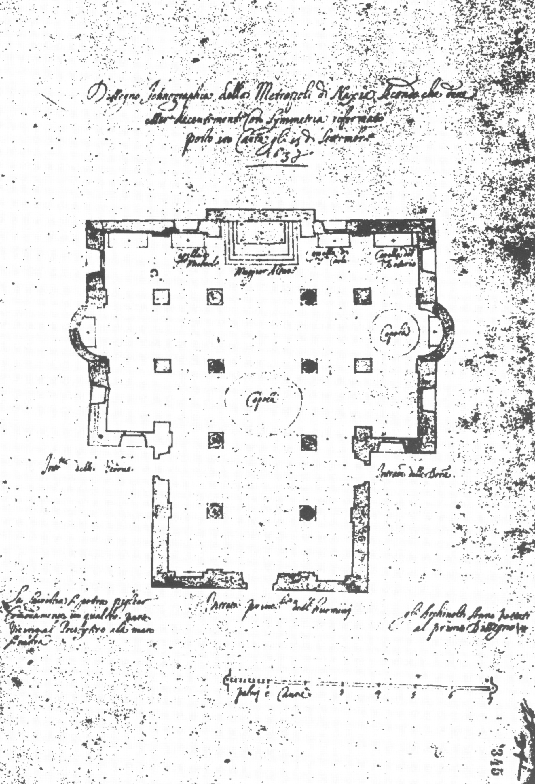 Die Metropoliskirche von Naxos nach einer Zeichnung aus dem Jahr 1638, Kykladen, Griechenland